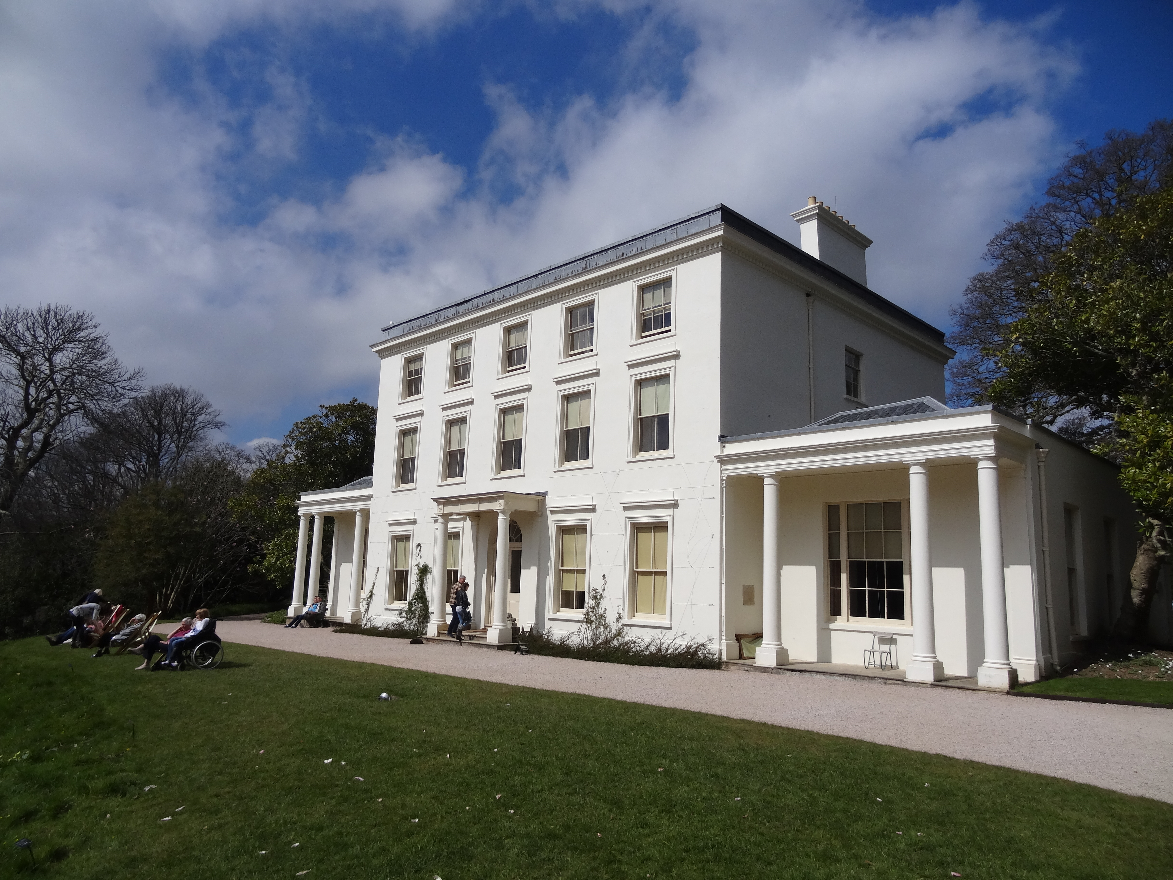 GREENWAY AGETHA CHRISTIES HOUSE